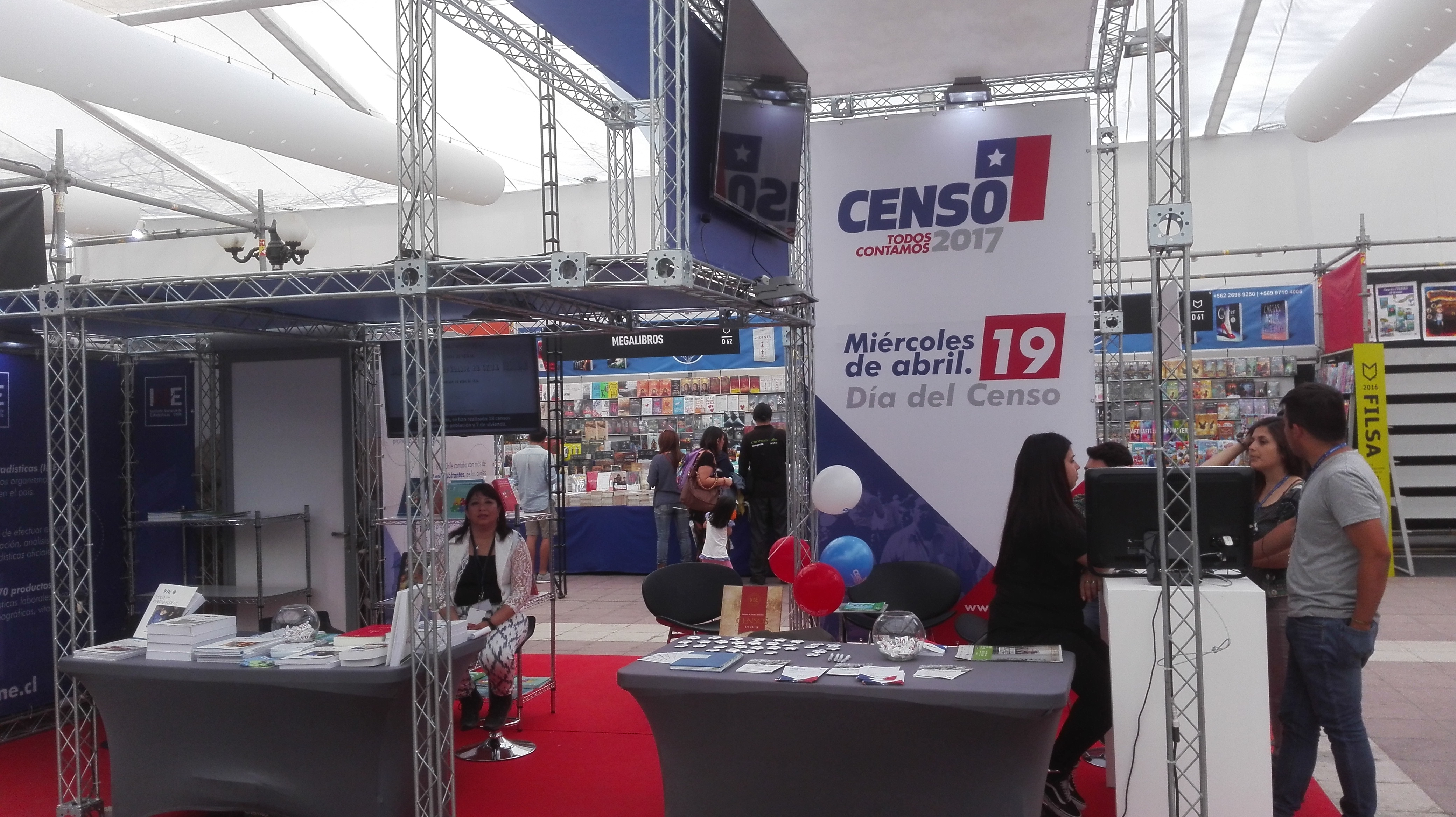 Stand del INE para promocionar el Censo 2017 en la FILSA 2016, Santiago, Chile.